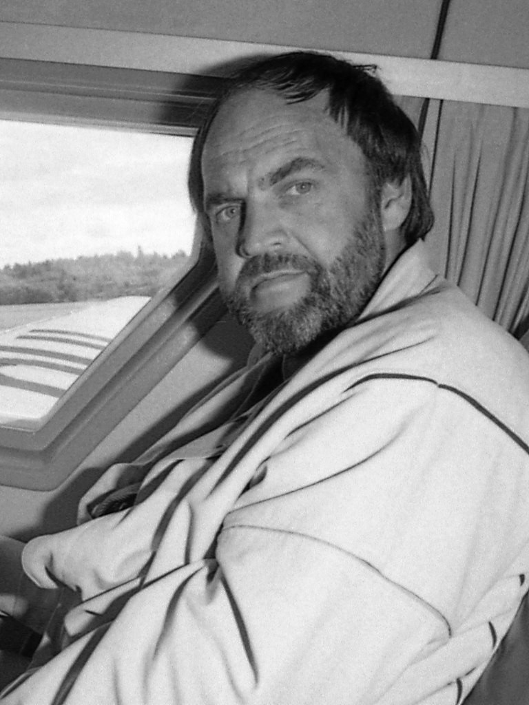 Bo Sehlberg